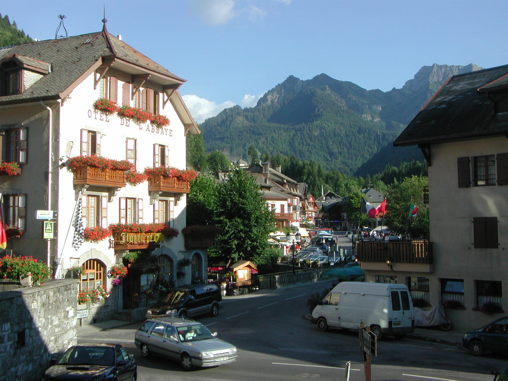 Abondance (Haute-Savoie, Rhône-Alpes, France).